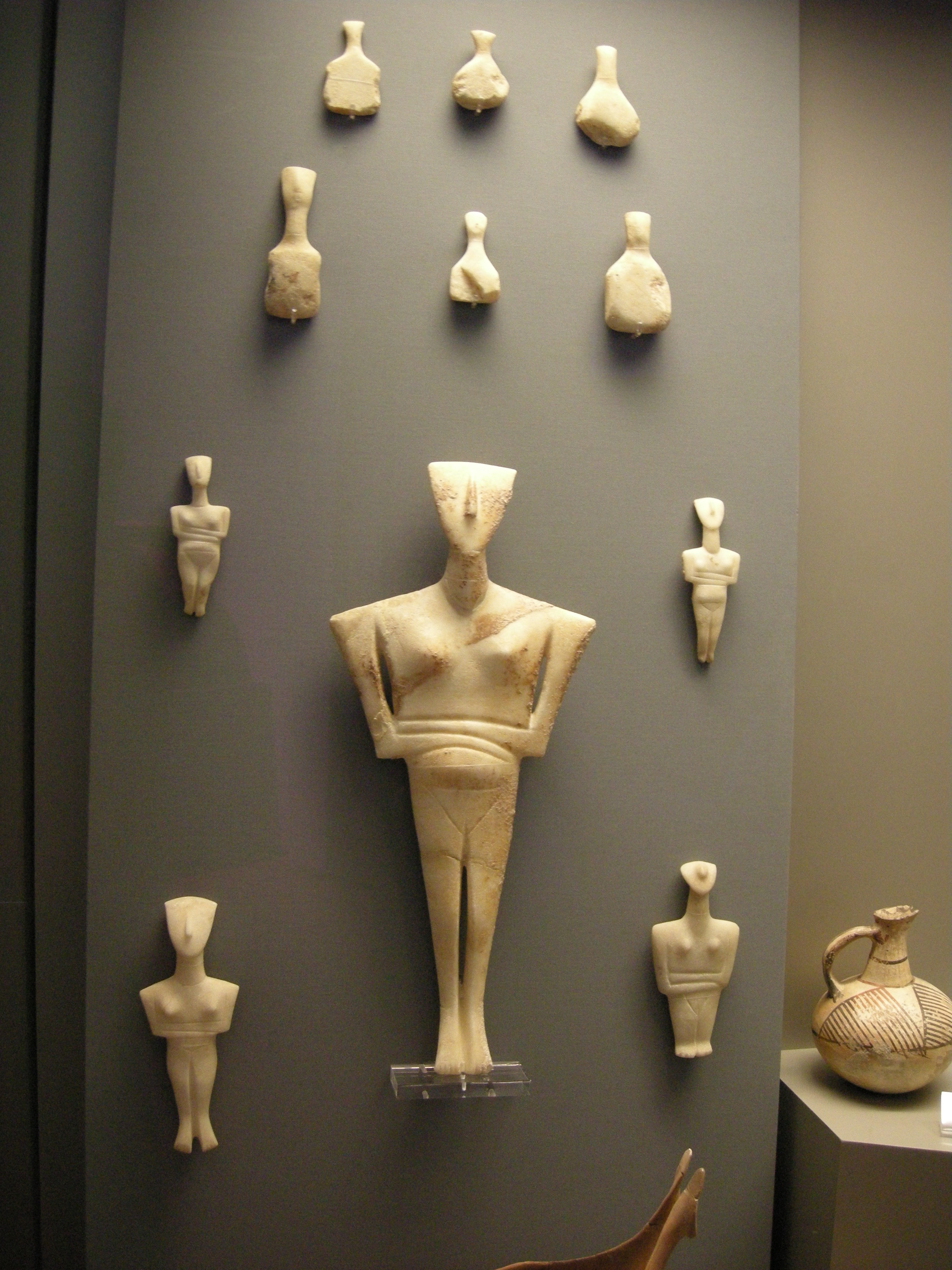 Cycladic idol